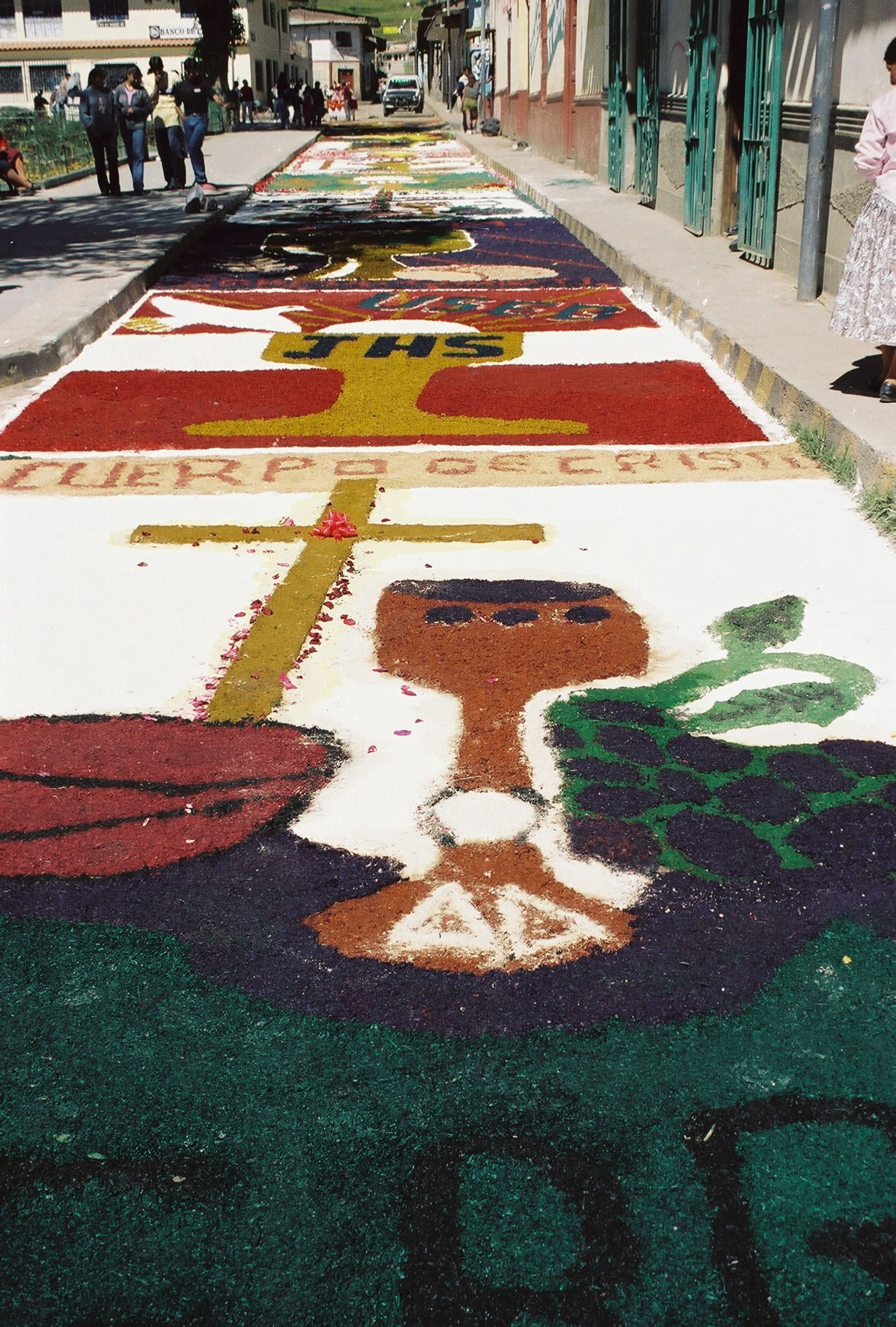 Bildteppiche zur Corpo Christi-Prozession in Chiquian Juni 2001 von Uta Freund